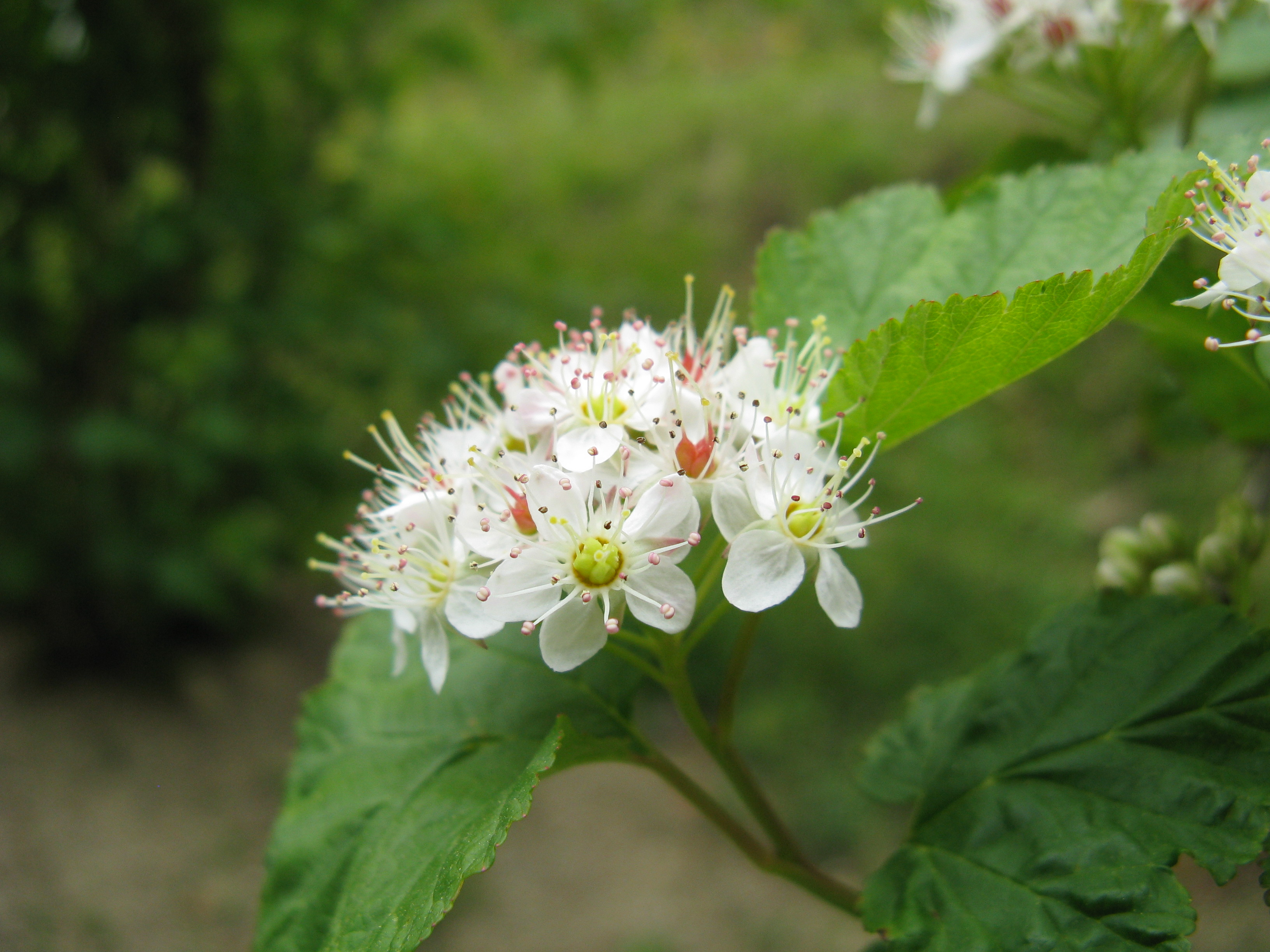 Physocarpus capitatus